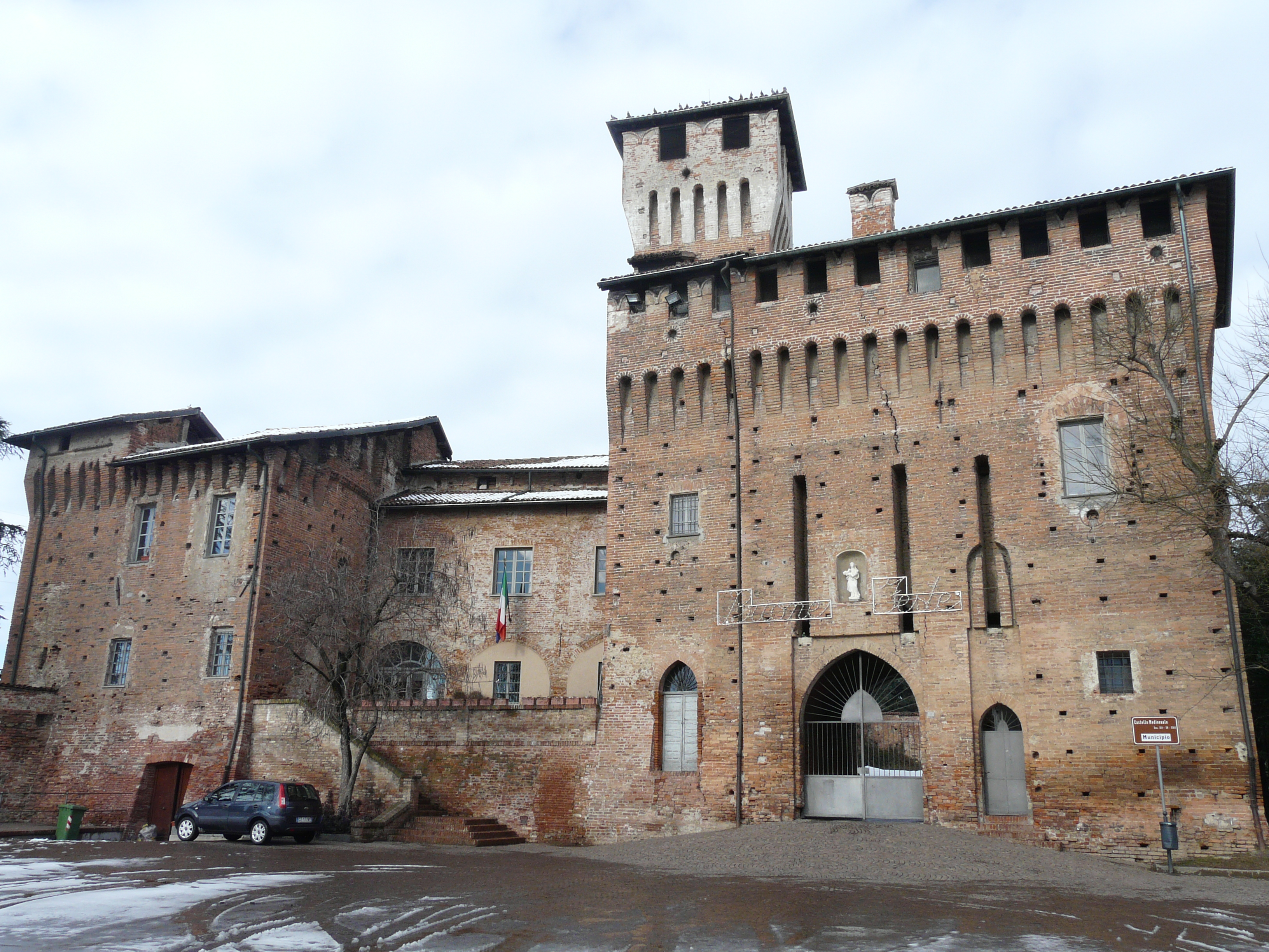 Castello-Municipio di Pozzolo Formigaro, Piemonte, Italy